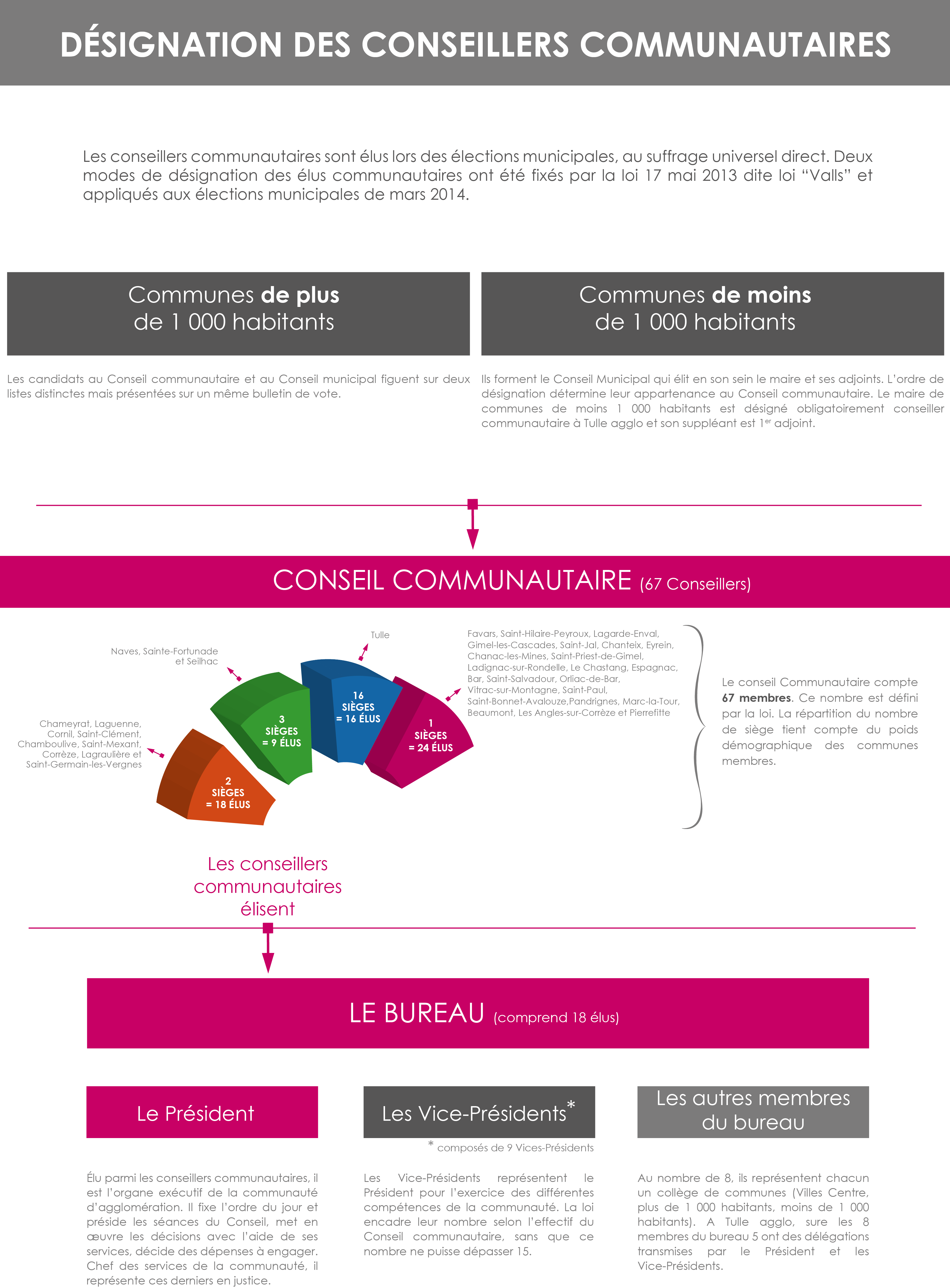 Schéma - Organisation d'une Communauté d'agglomération